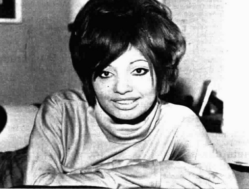 Italian-Eritrean singer Lara Saint Paul